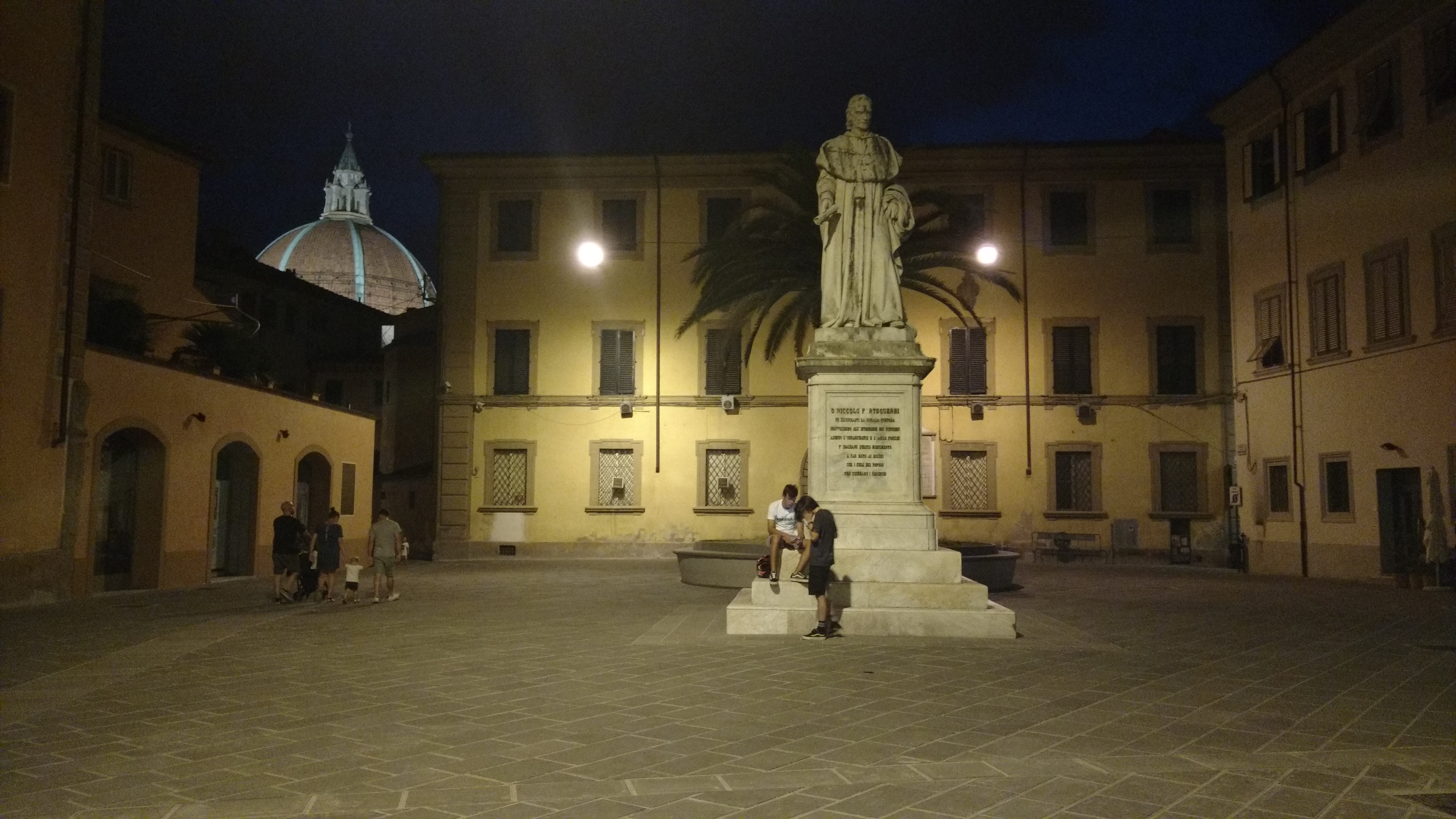 Monumento "Niccolo Forteguerri" This is a photo of a monument which is part of cultural heritage of Italy.